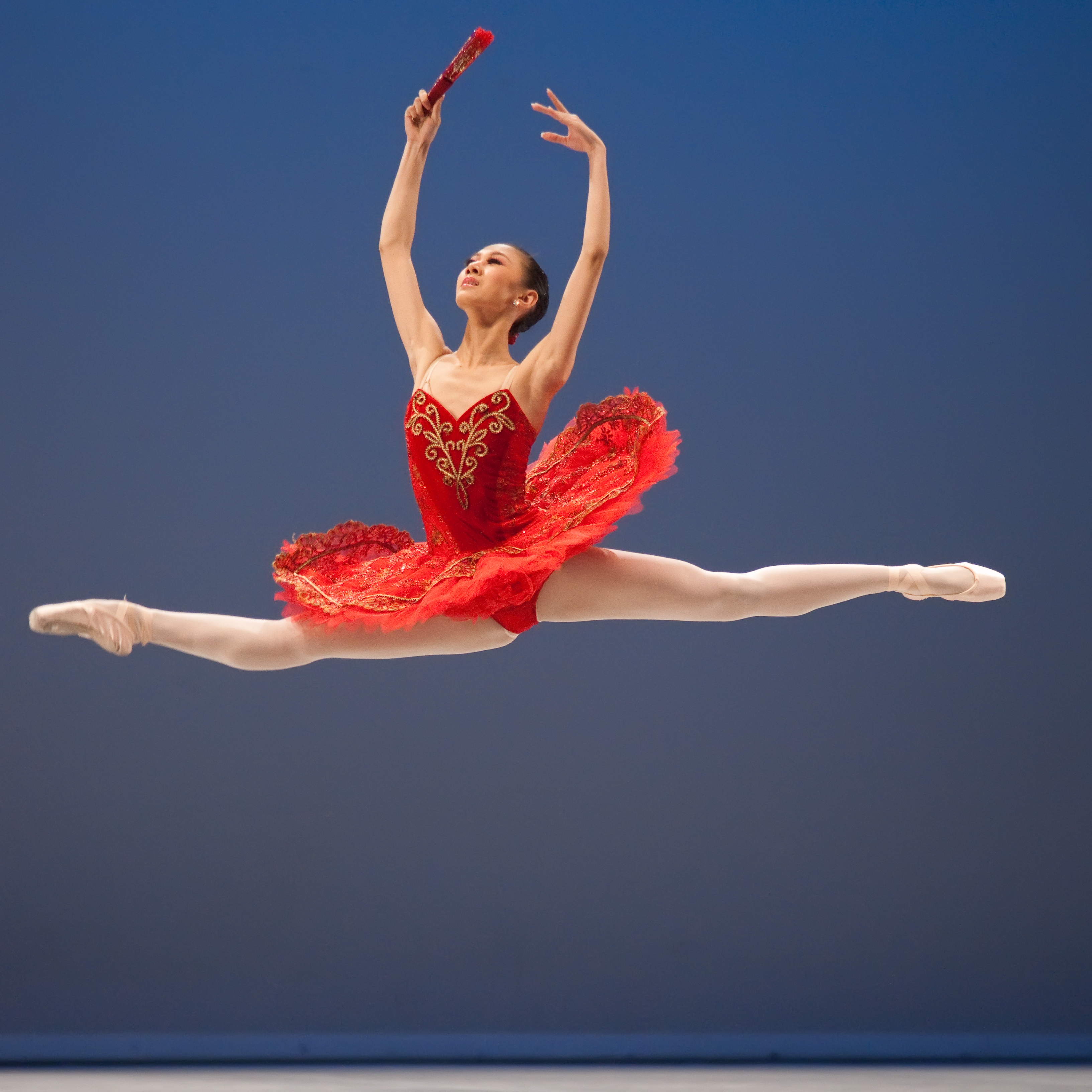 Variation extraite de Don Quichotte au Prix de Lausanne 2010. The making of this document was supported by Wikimedia CH. (Submit your project!) For all the files concerned, please see the category Supported by Wikimedia CH.